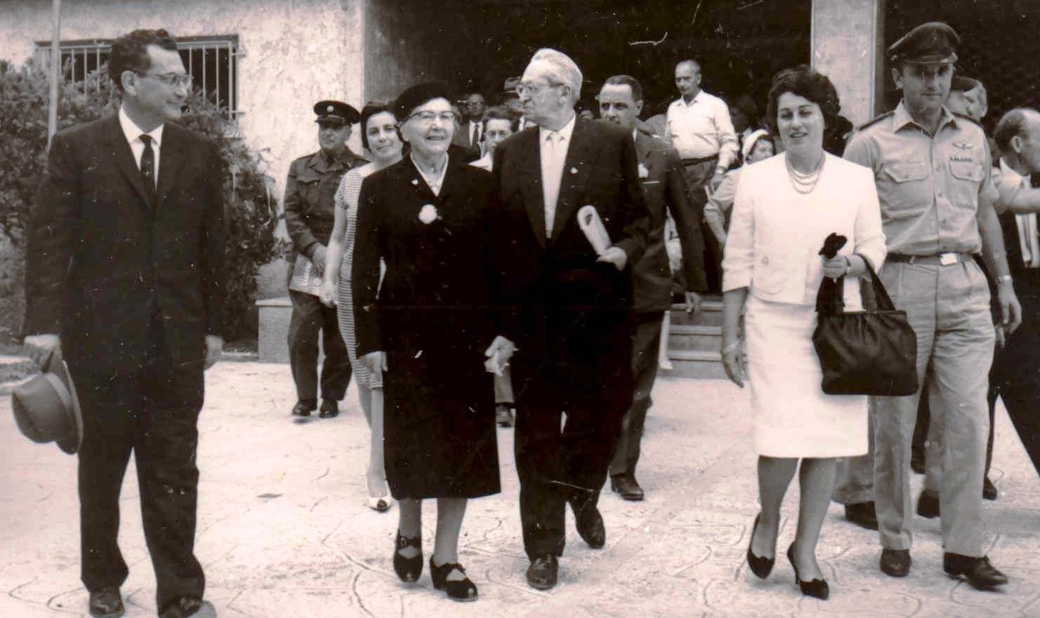 ביקור הנשיא השני יצחק בן צבי ברחובות. בתמונה במרכז ולצידו רעייתו רחל ינאית בן צבי. משמאלה יצחק כץ ראש הירייה ומימינו של הנשיא, ניצה כץ.